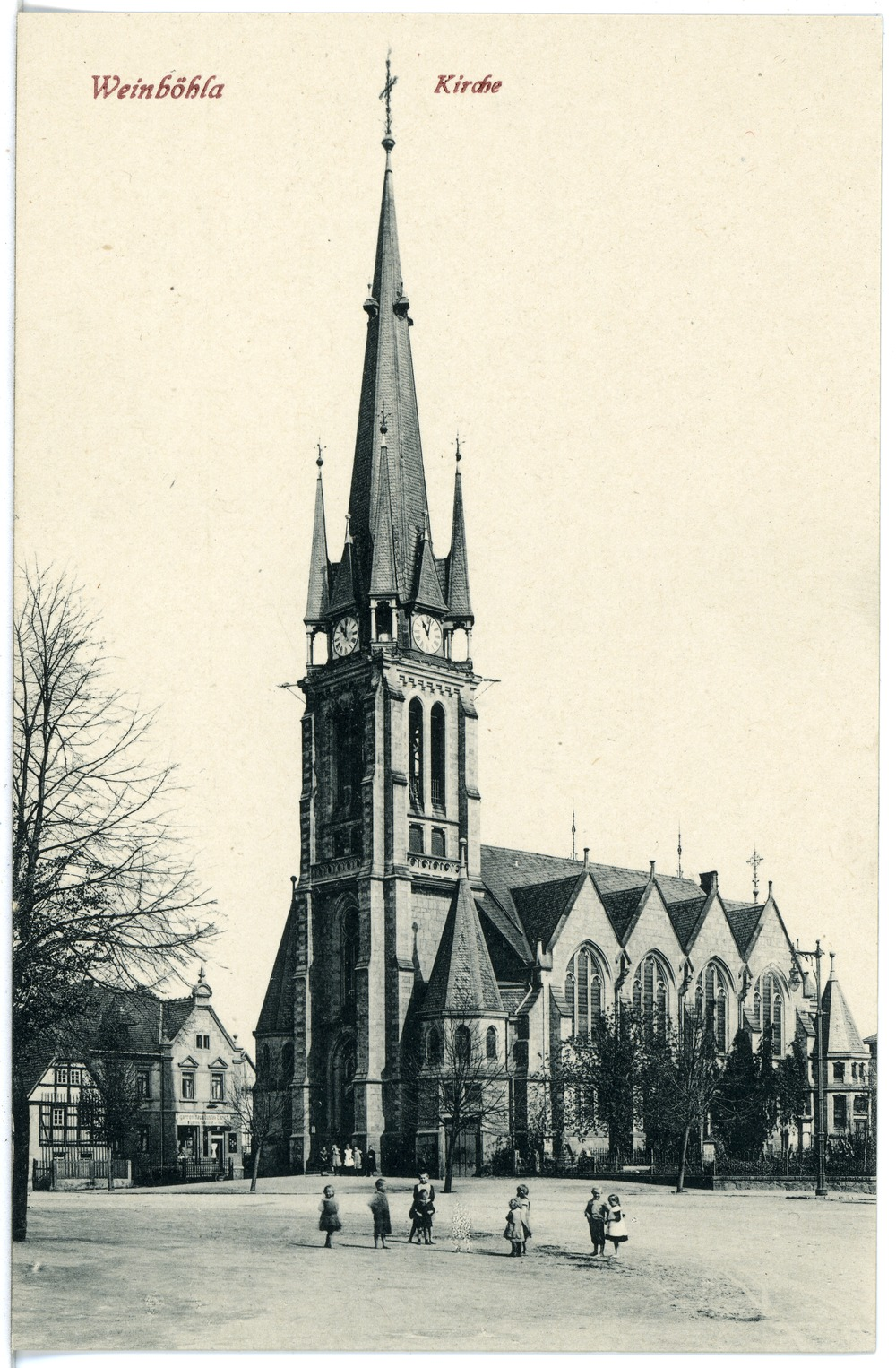 Weinböhla; Kirche This postcard is from publisher Brück & Sohn in Meißen ( postcard has a unique number 20440 and is available in a higher resolution at the publisher. This images was uploaded in a cooperation project between Wikipedians and the publisher.